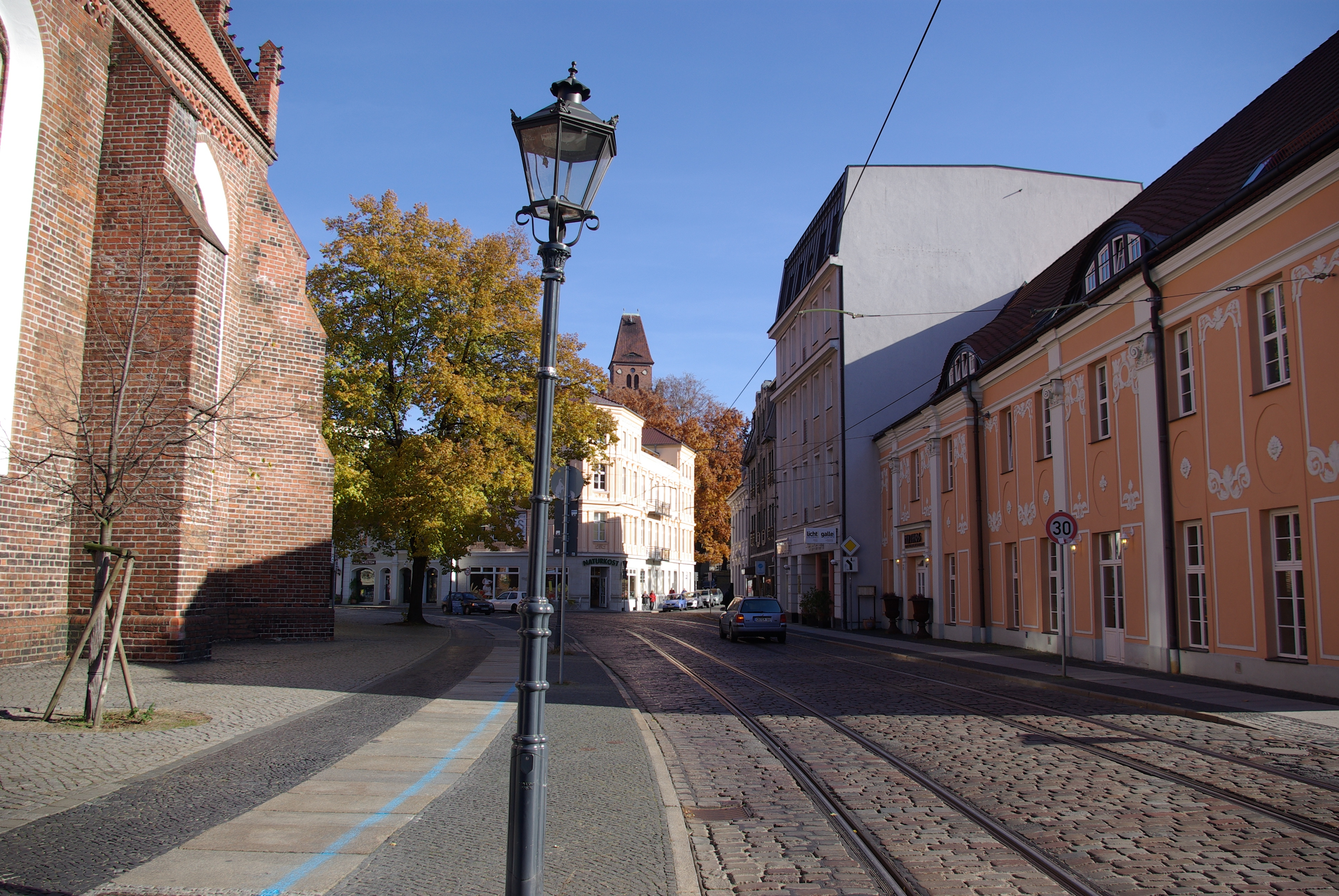 Cottbus in Brandenburg. Die Sandower Straße vom Altmarkt in Richtung Gerichtspaltz. Links steht die Oberkirche St. Nikolai, rechts das Haus Sandower Straße 54. Die Sandower Straße geht hinter der Kirche links weiter in Richtung Sandower Brücke.